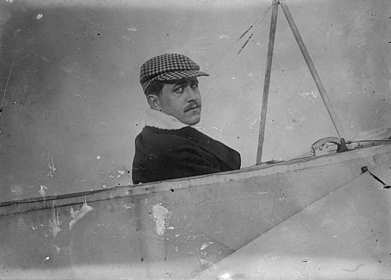 Léon Morane (1885-1918) , French aviator